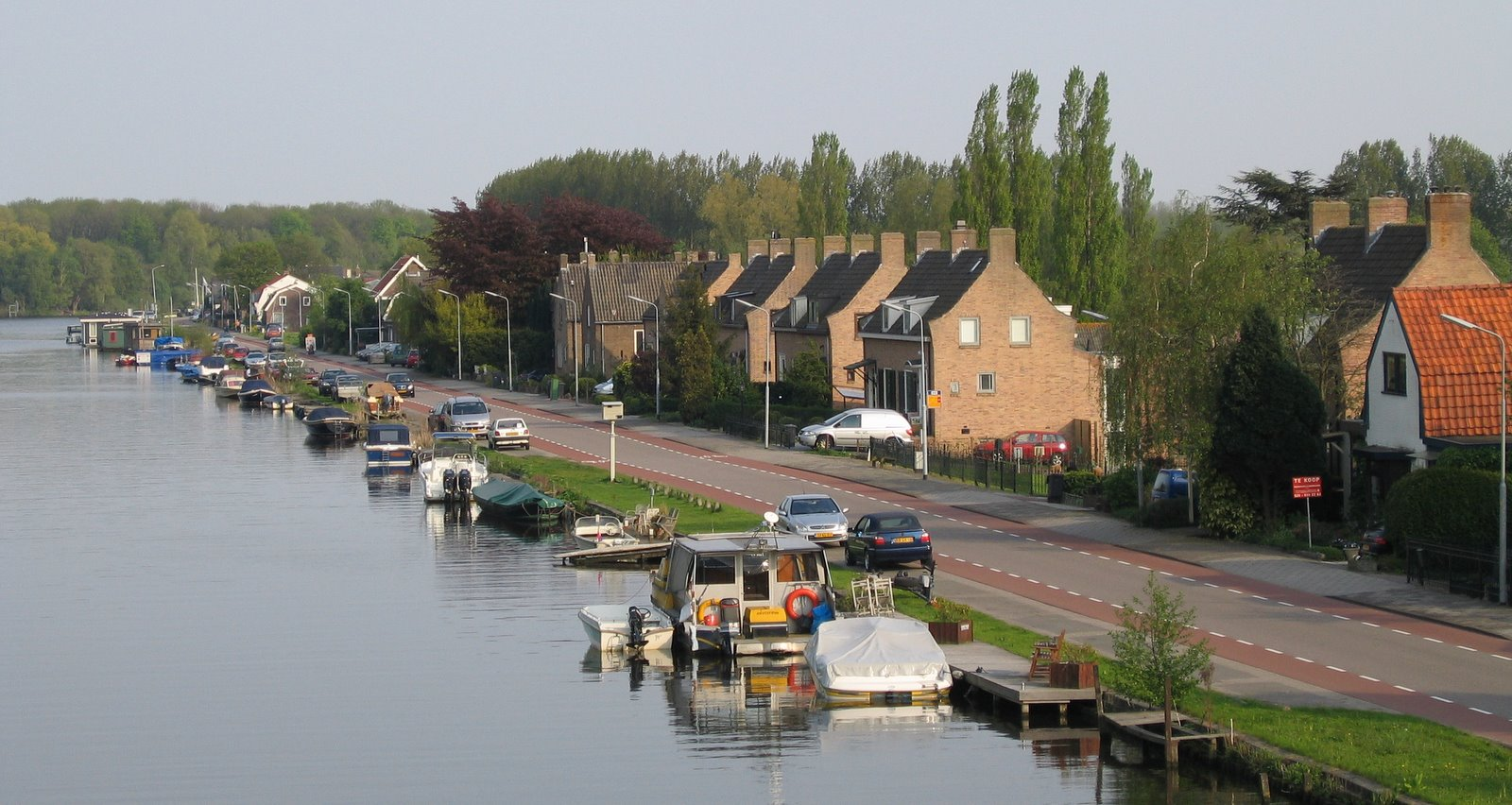 Nieuwemeerdijk en ringvaart Haarlemmermeer